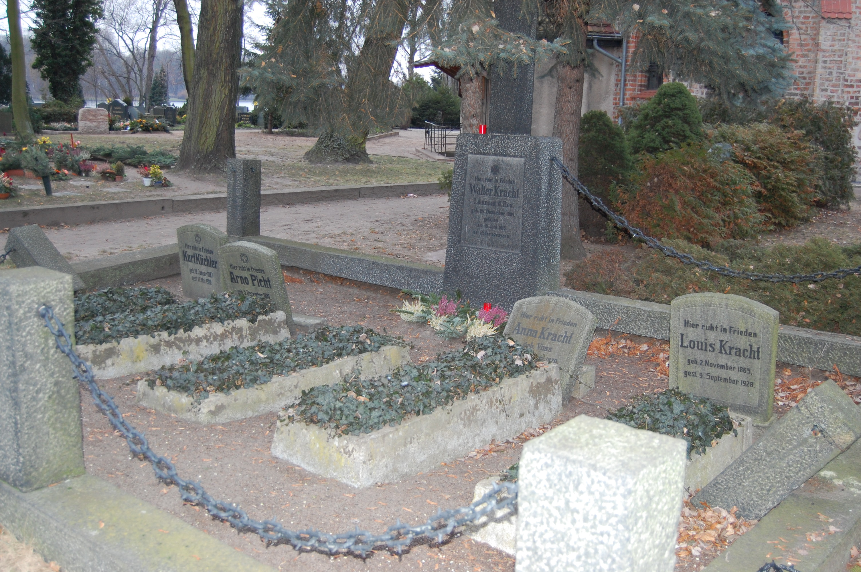 Grabsteine von Louis Kracht und seiner Familie, Friedhof Stralau